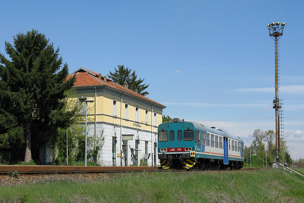 Stazione ferroviaria di Rovasenda Alta, con l'automotrice ALn 663.1170.